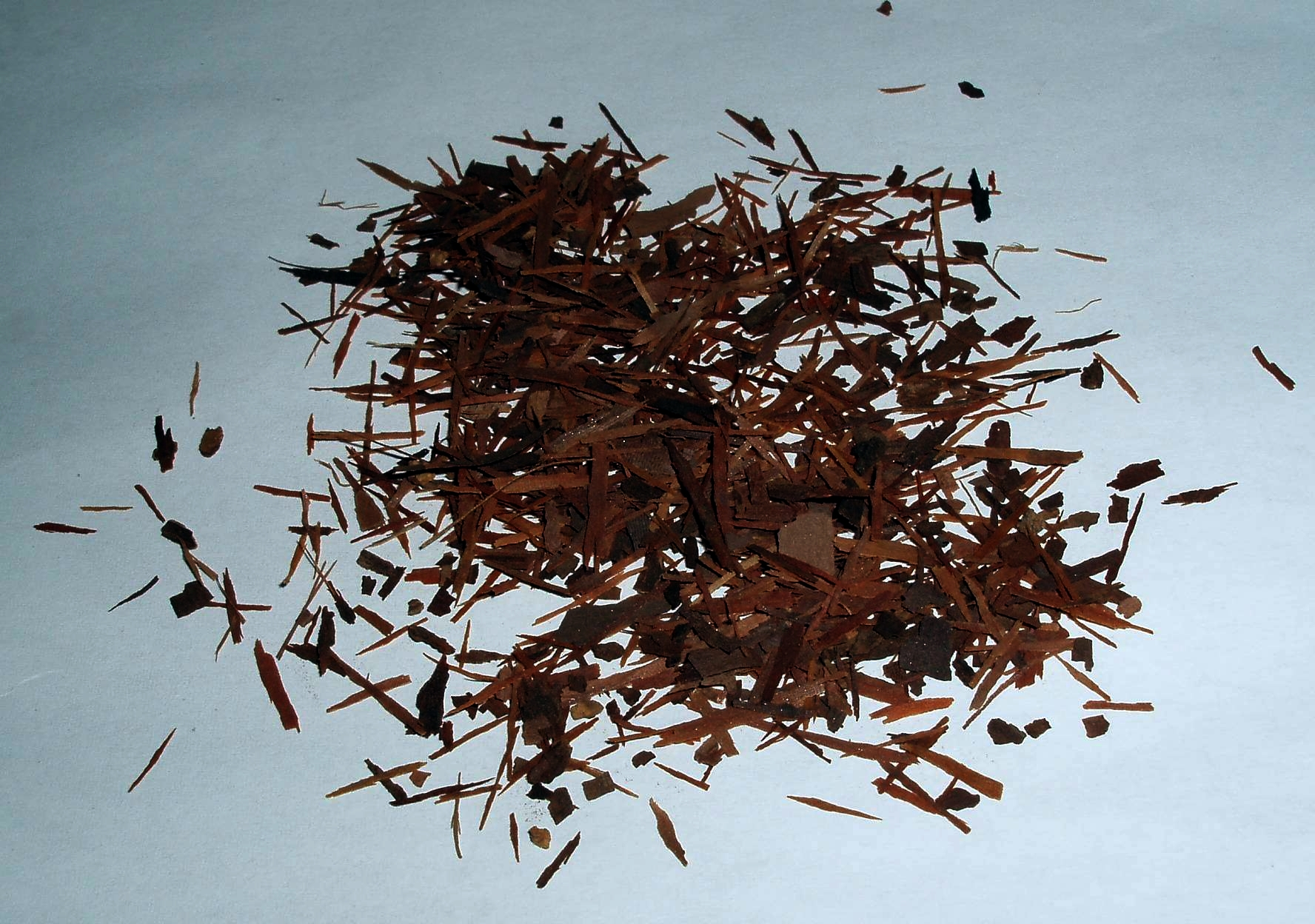 Baumrinde des Lapacho zur Teezubereitung